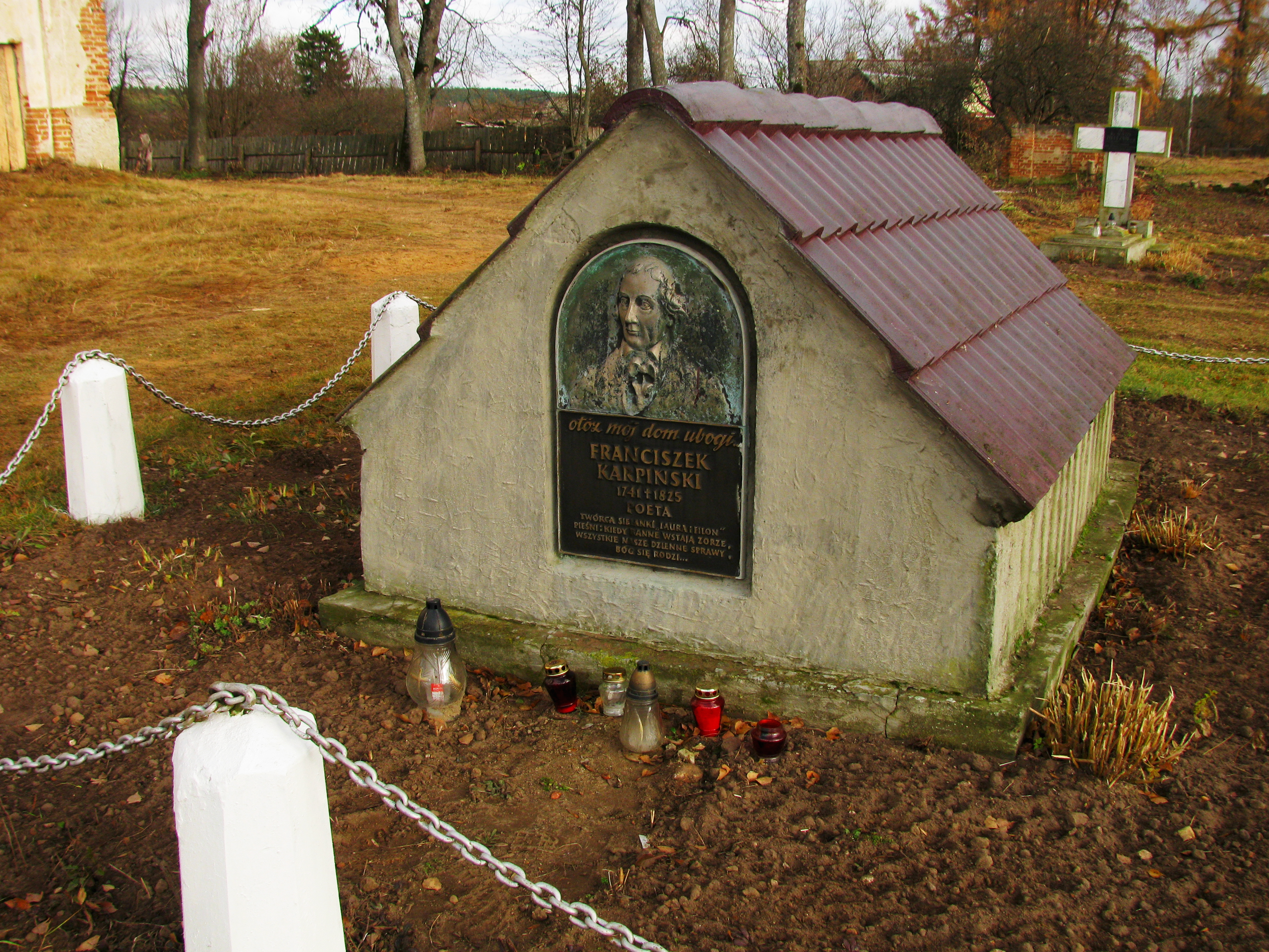 Беларуская (тарашкевіца): Былы кляштар місыянэраў: Траецкі касьцёл, жылы корпус. в. Лыскава This is a photo of Belarusian heritage monument. Reference number: 112Г000621 ( WLM)